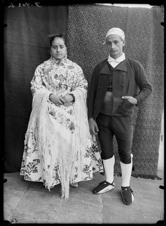 Imatge